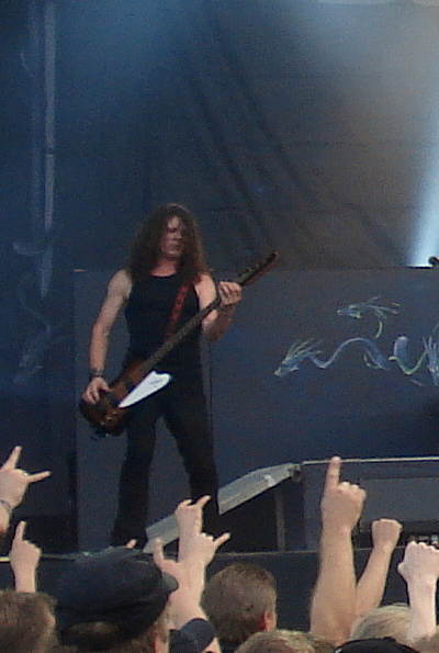 Nibbs Carter na koncercie Saxon